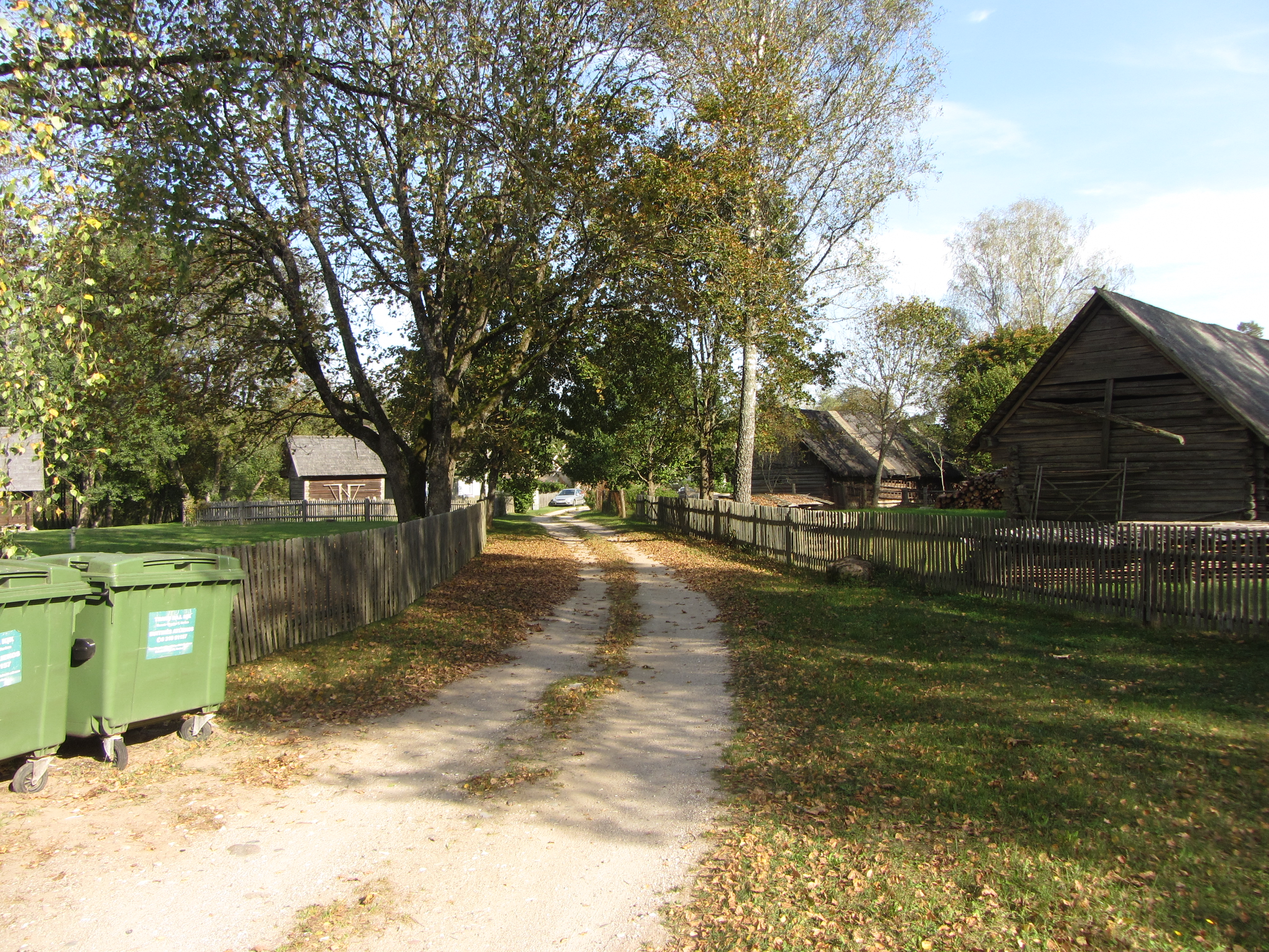 Kašėtos 65344, Lithuania